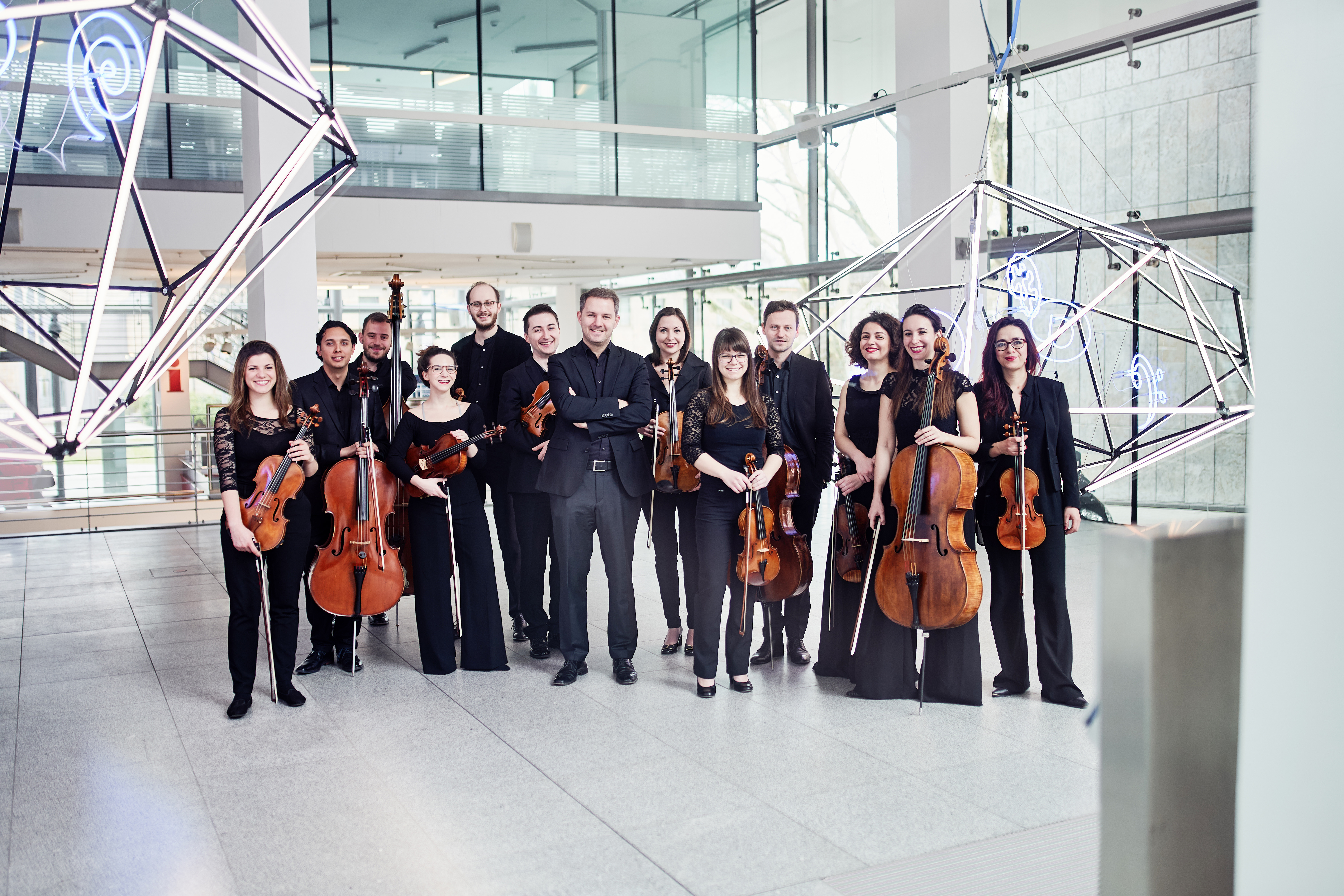 by Pgwiazda Photographie